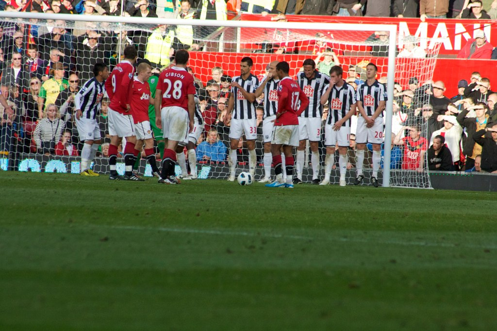 _MG_8154